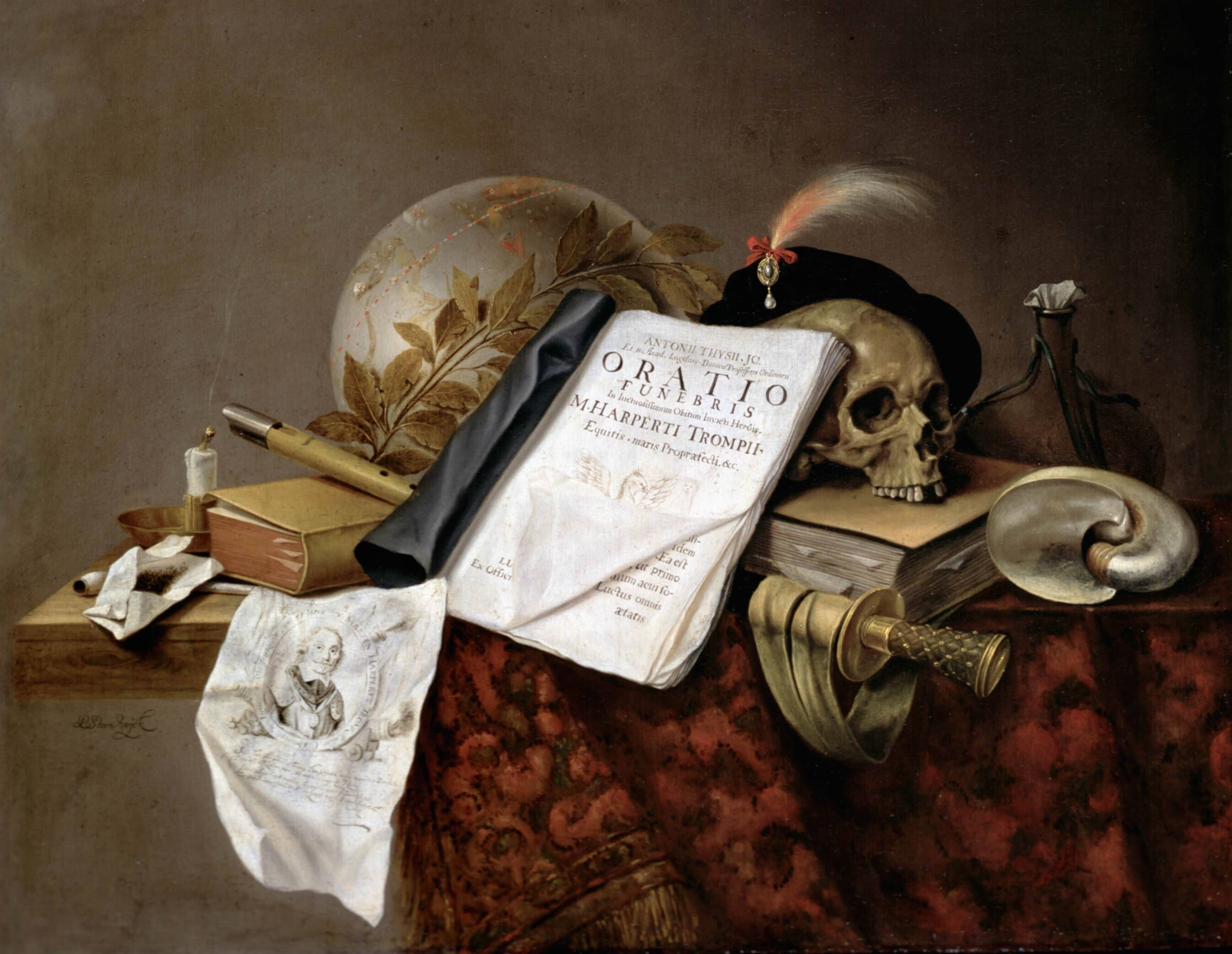 Vanitas-Stilleben zum Tod Maarten Harpertszoon Tromp in der Seeschlacht bei Terheide 1653